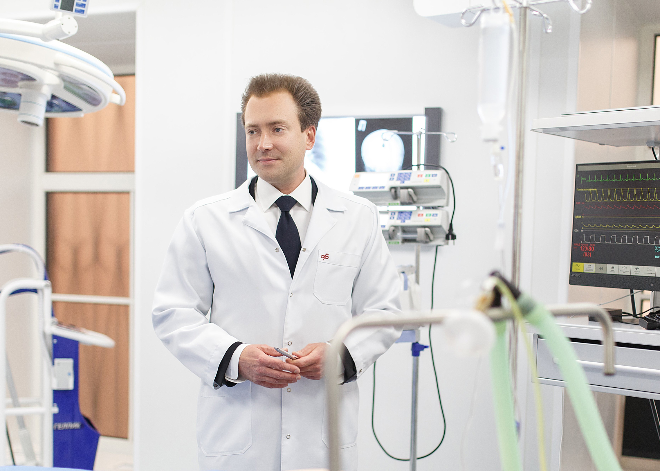 Гречко, Андрей Вячеславович в лаборатории изучения перспективных симуляционных технологий ФНКЦ РР